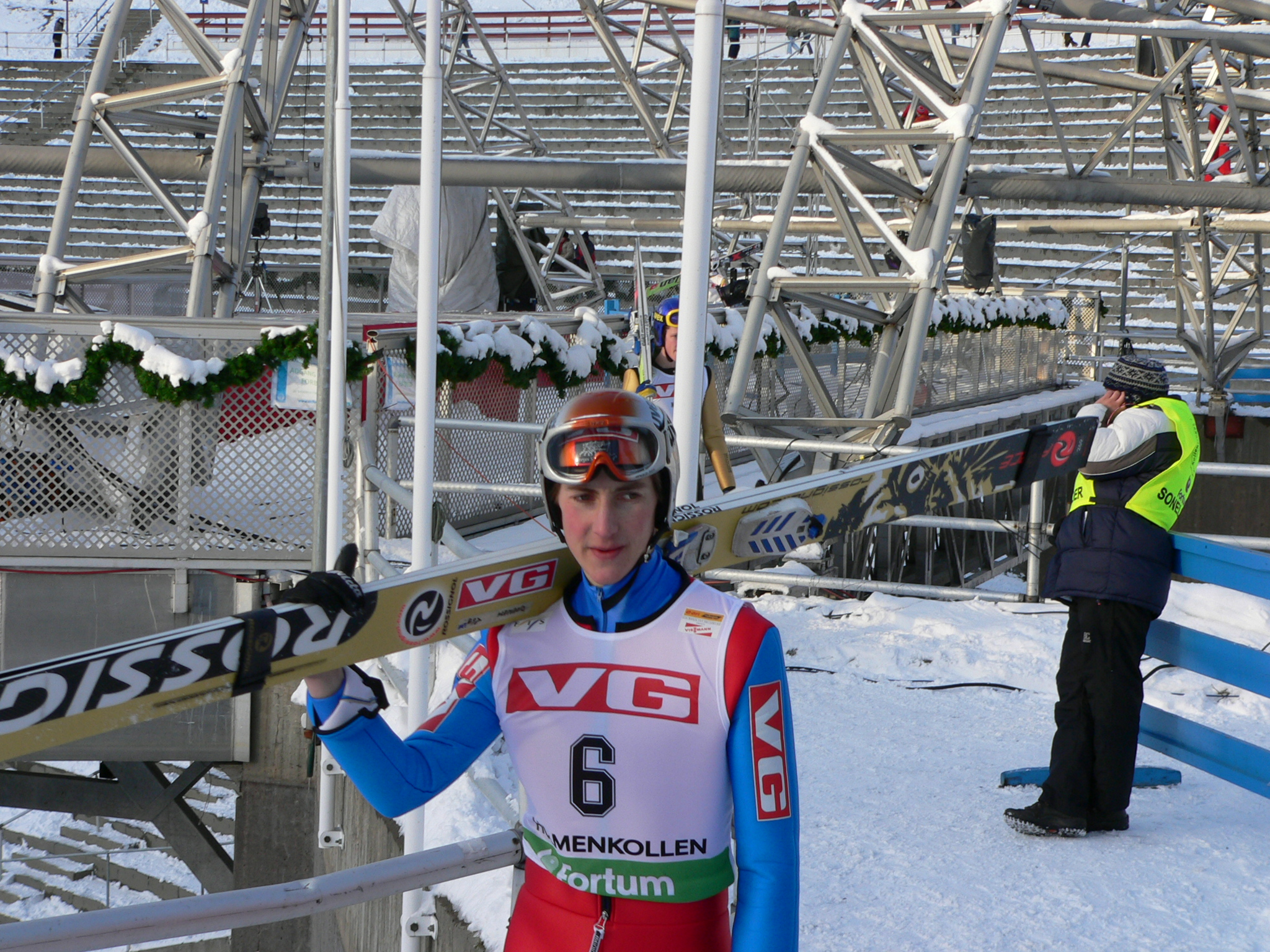 Olav Magne Donnem, from the 2005 World Cup ski jumping event in Holmenkollen.